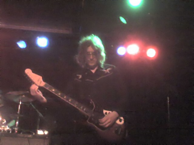 Jace Lasek at Les Saints venue in Montreal, 2008